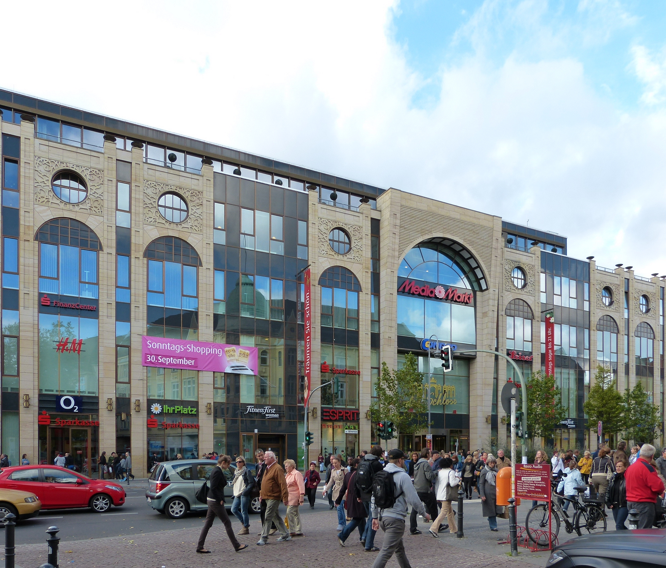 Berlin-Steglitz, Schloßstraße, Einkaufszentrum "Das Schloss"